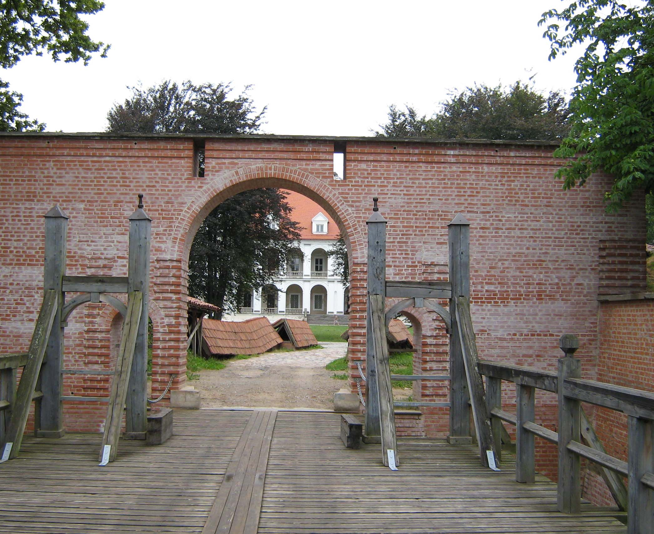 Birzai castle 2006 07 30 Ubiqve